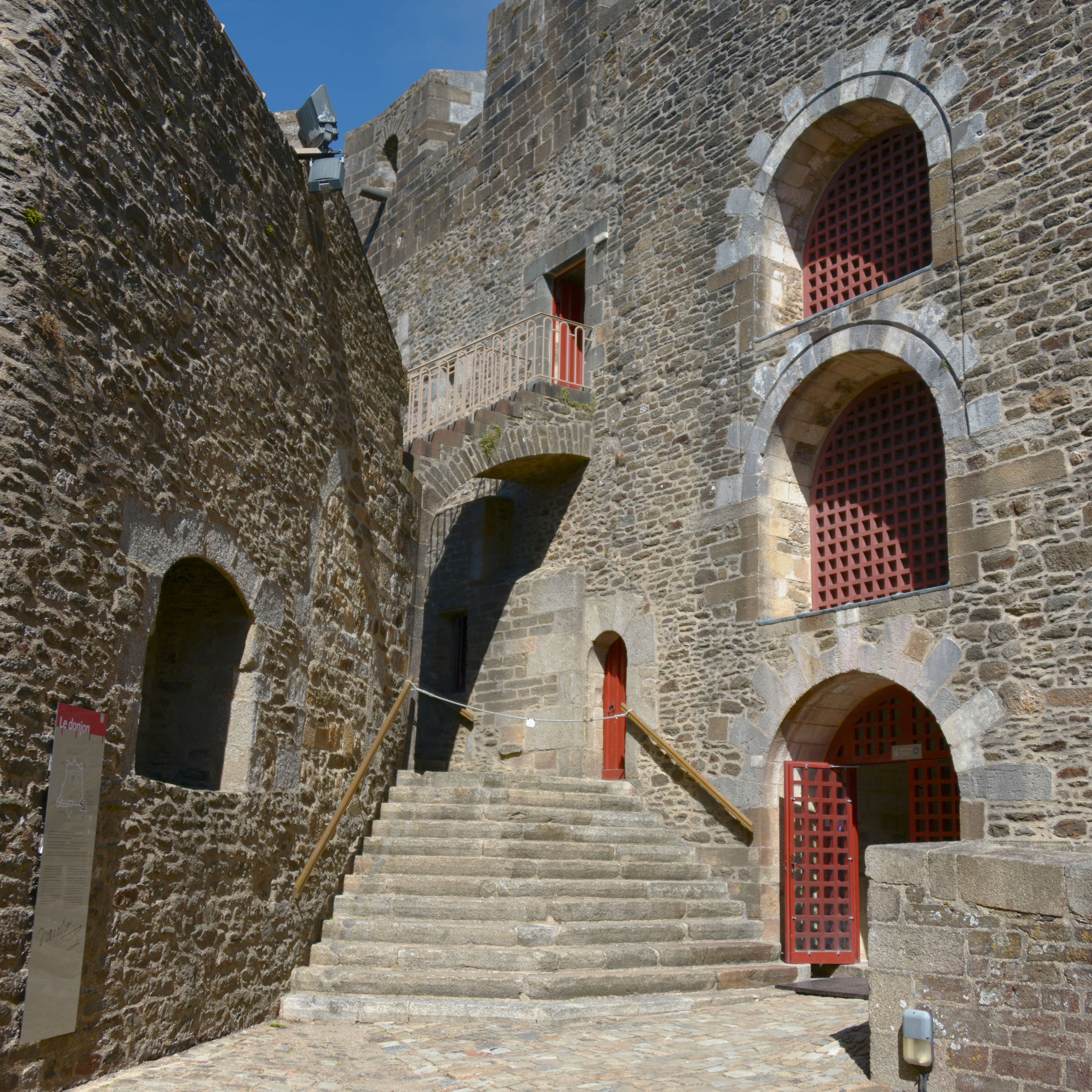 Cour du donjon du château de Brest .